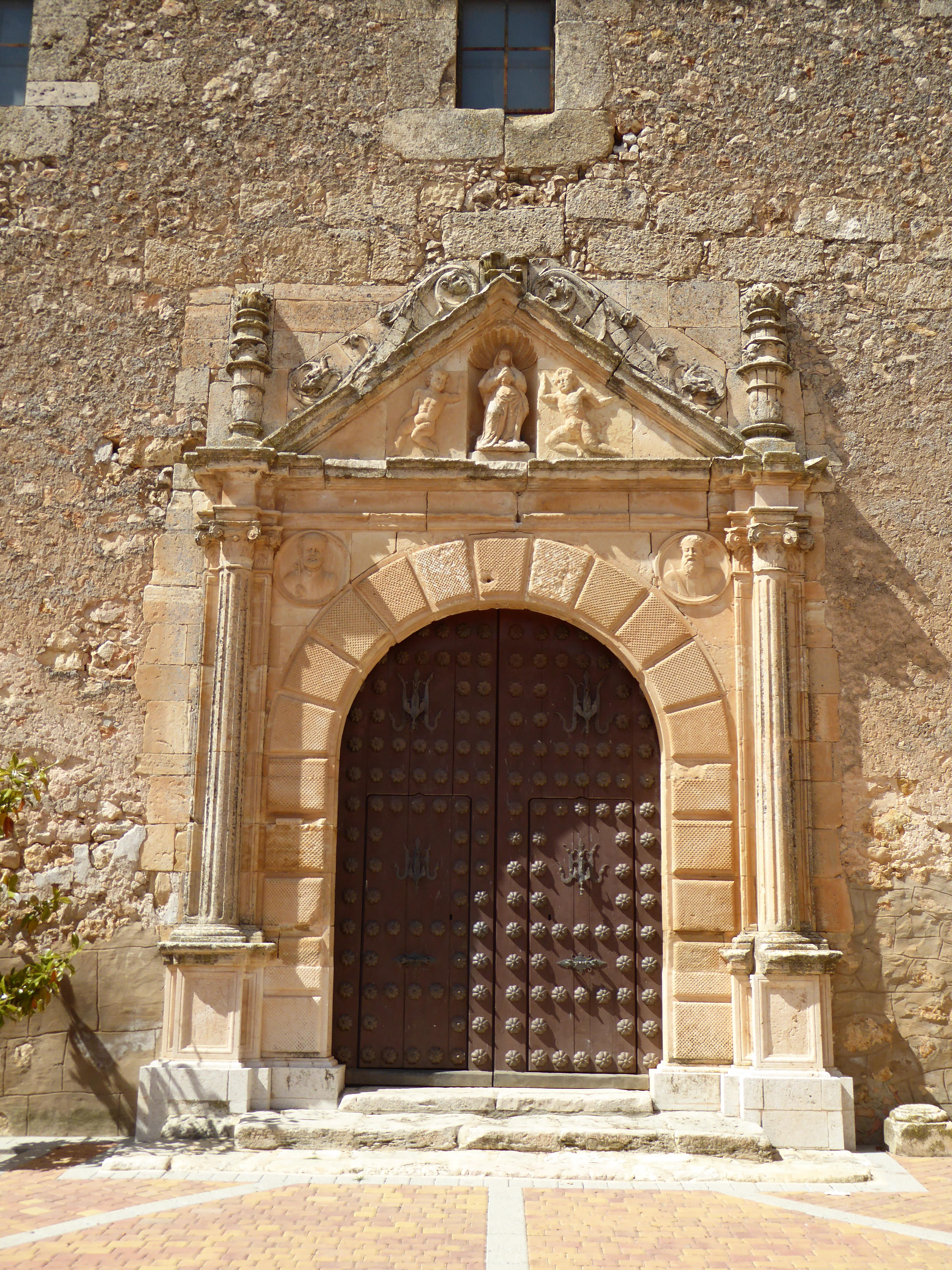 Tribaldos